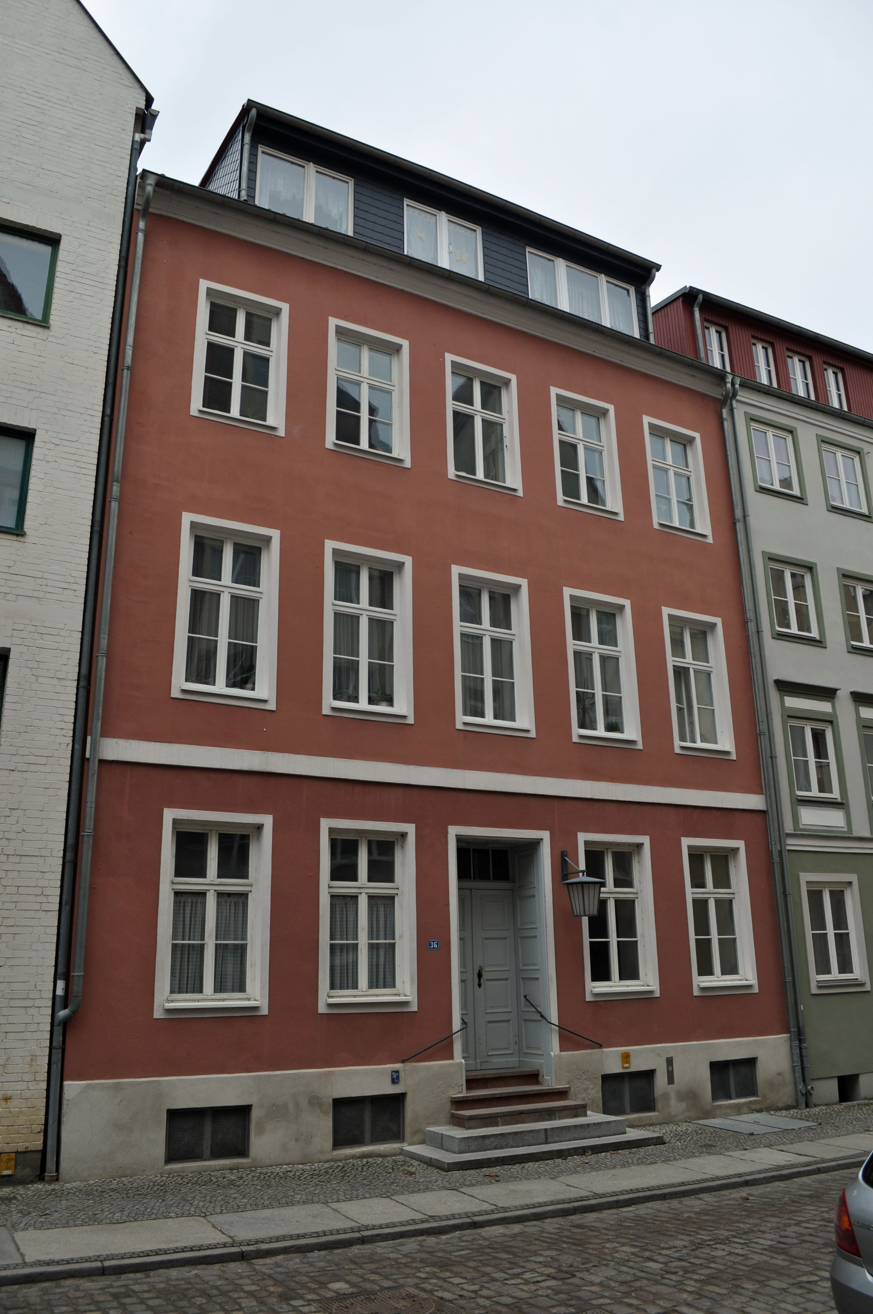 Gebäude bzw. Gebäudedetail in Stralsund. Straße und Hausnummer siehe Dateiname.